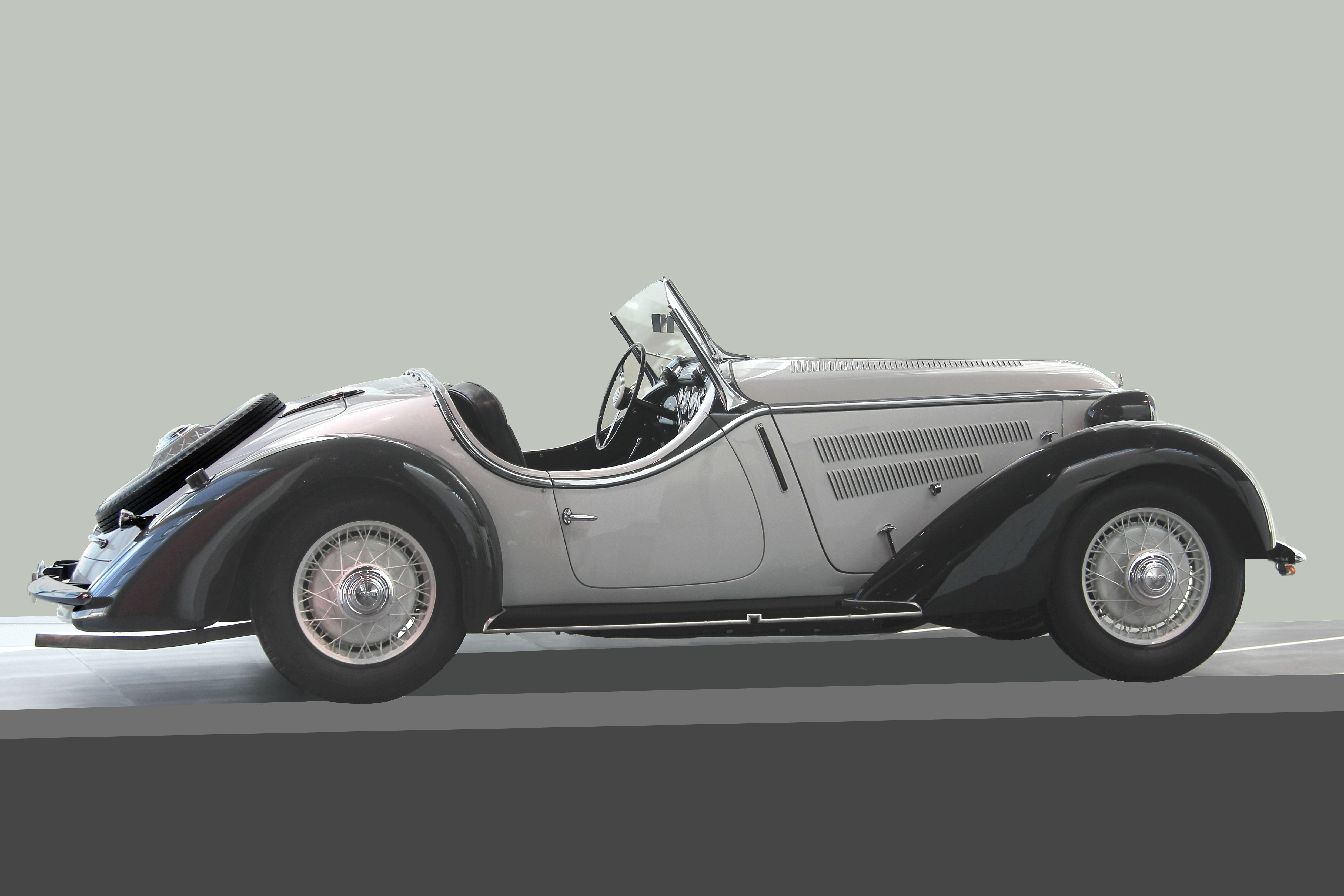 Wanderer W 25 K, Baurjahr 1938, im museum mobile: 6-Zylinder-Viertakt-Reihenmotor mit Kompressor, 1963 cm³ (Bohrung 70 mm, Hub 85 mm), 85 PS bei 4000/min (lt. Infotafel im museum mobile), Höchstgeschwindigkeit 145 km/h, Verbrauch 20 l/100 km, Preis 7.950 RM, 259 Stück gebaut, Bauzeit 1936 bis 1938